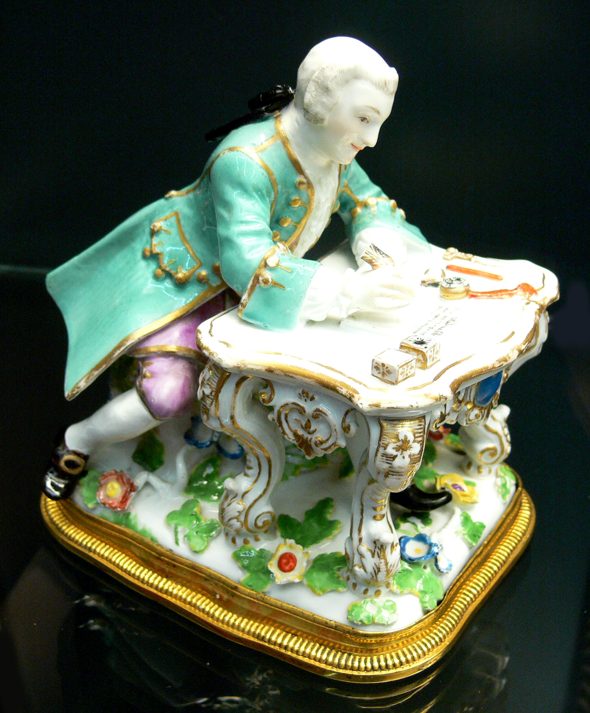 Kavalier am Schreibtisch, Figur von Johann Joachim Kändler, Meißener Porzellan, um 1740. Reiss-Engelhorn-Museen, Mannheim (Zeughaus)